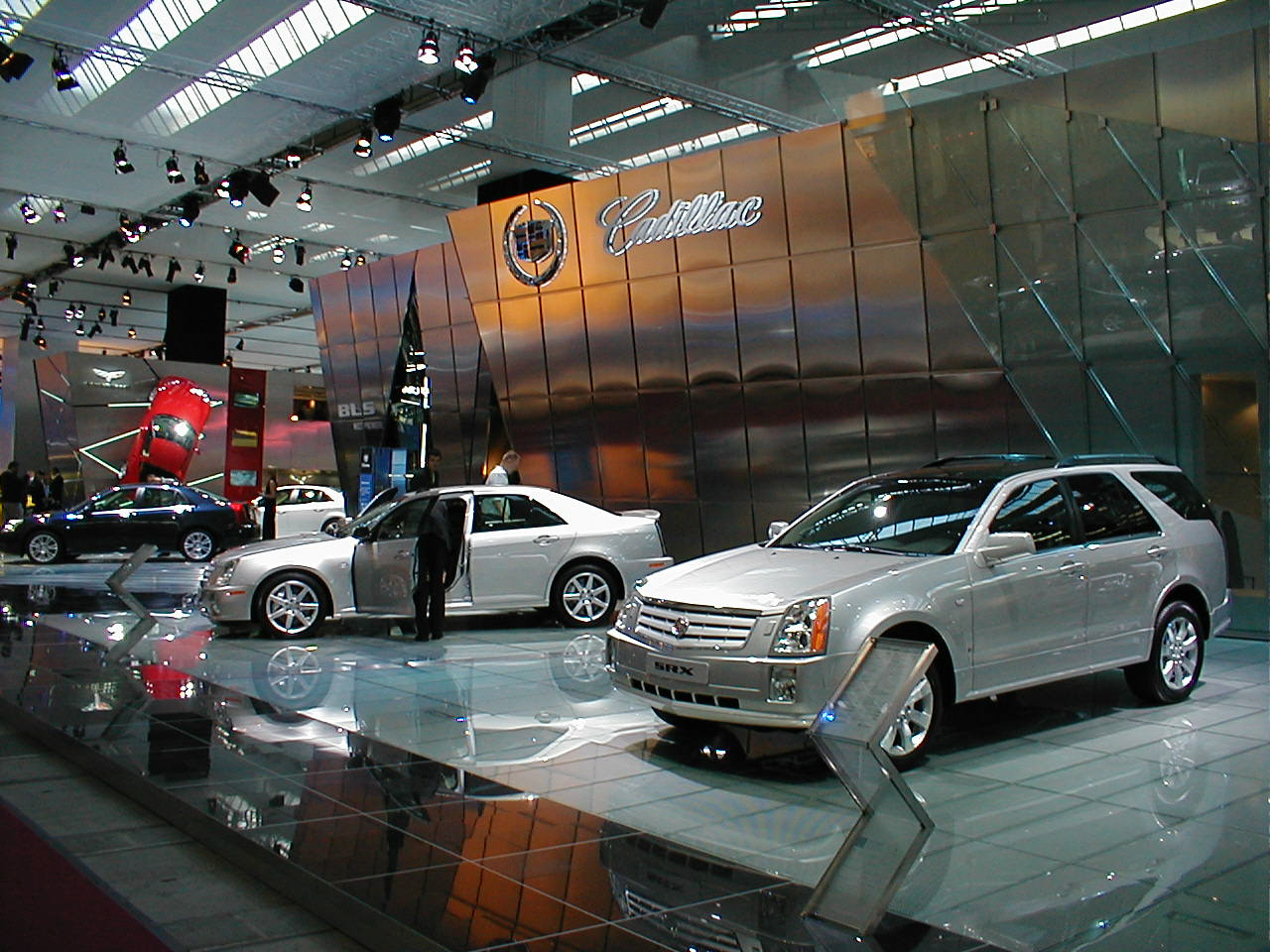 Cadillac auf der IAA 2005, Foto selbst angefertigt, GNU-FDL